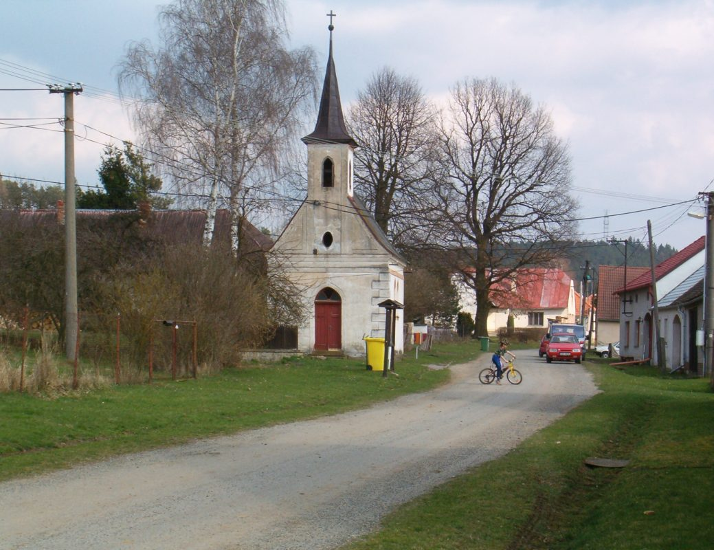 Náves s kapličkou v Marketě